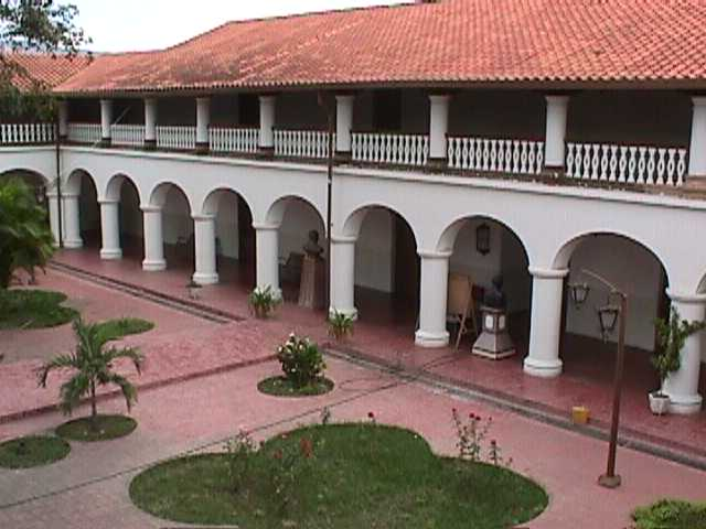 Casa de la Cultura Profesor José Ángel Rodríguez López en El Tocuyo, estado Lara - Venezuela 1999